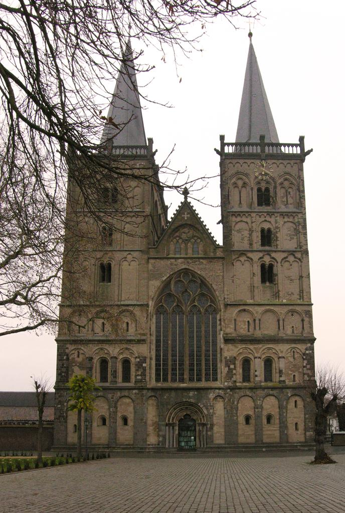 Xanten, Dom